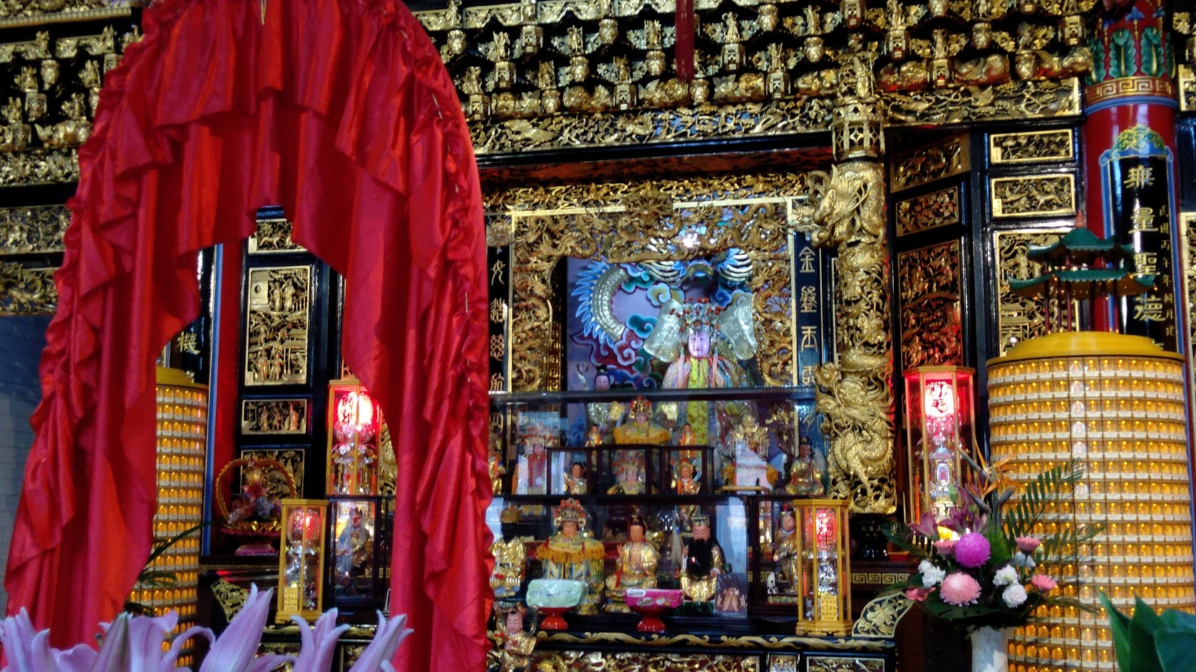 中文（台灣）: 新莊慈惠堂 無極寶殿 正殿一景